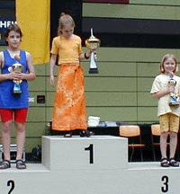 Saskia Zikeli, Judith Fuchs und Lara Stock, Deutsche Jugendeinzelmeisterschaft 2000 der weiblichen Jugend U10 in Überlingen.